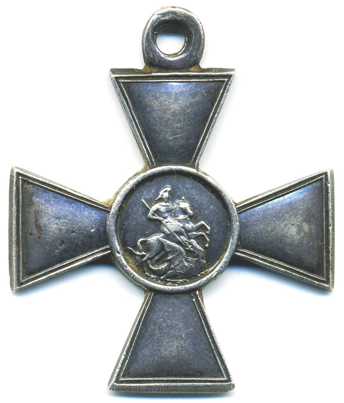 Аверс (лицевая сторона) Георгиевского креста 3 и 4 степени